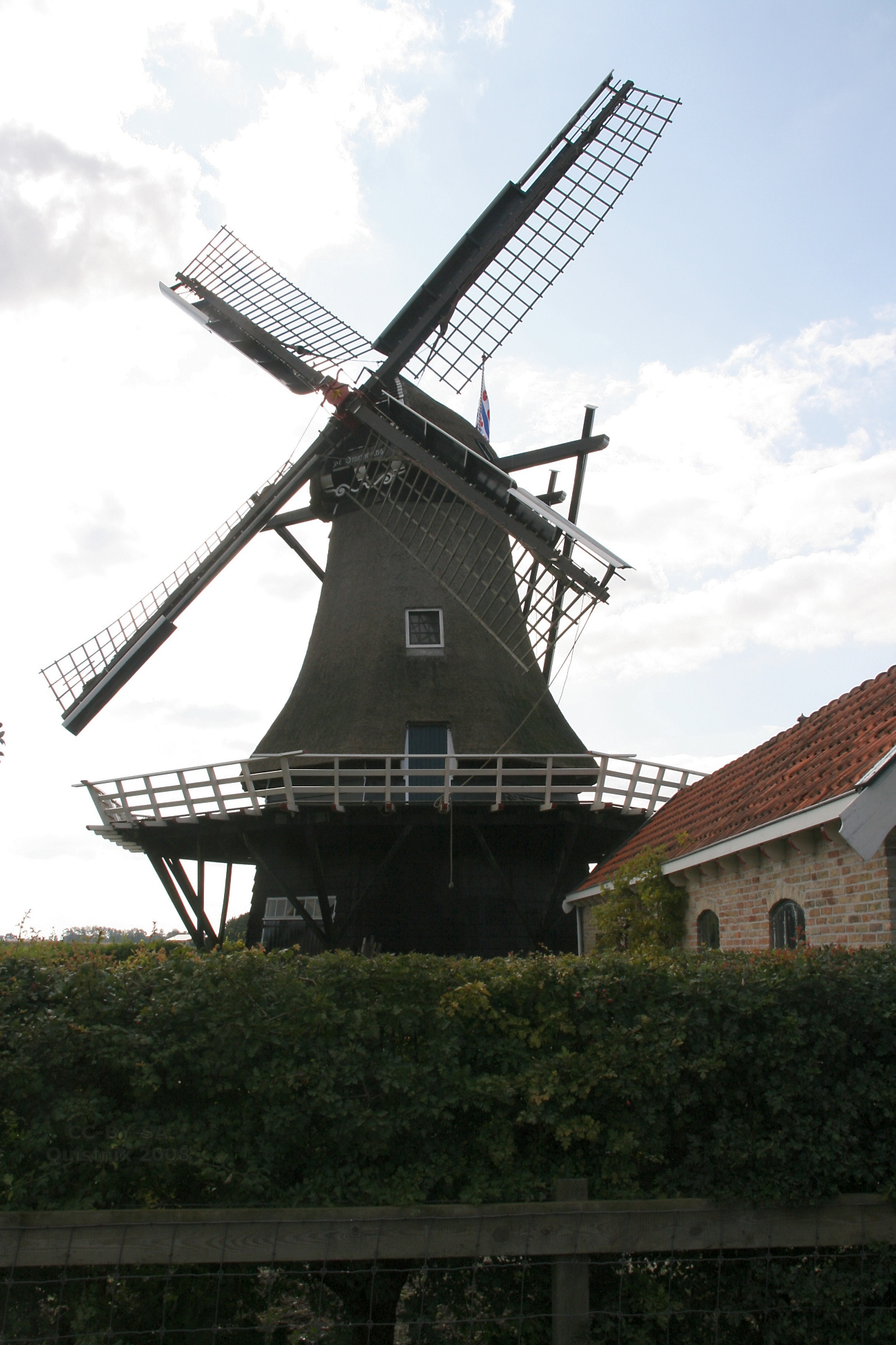 Witmarsum: molen De Onderneming